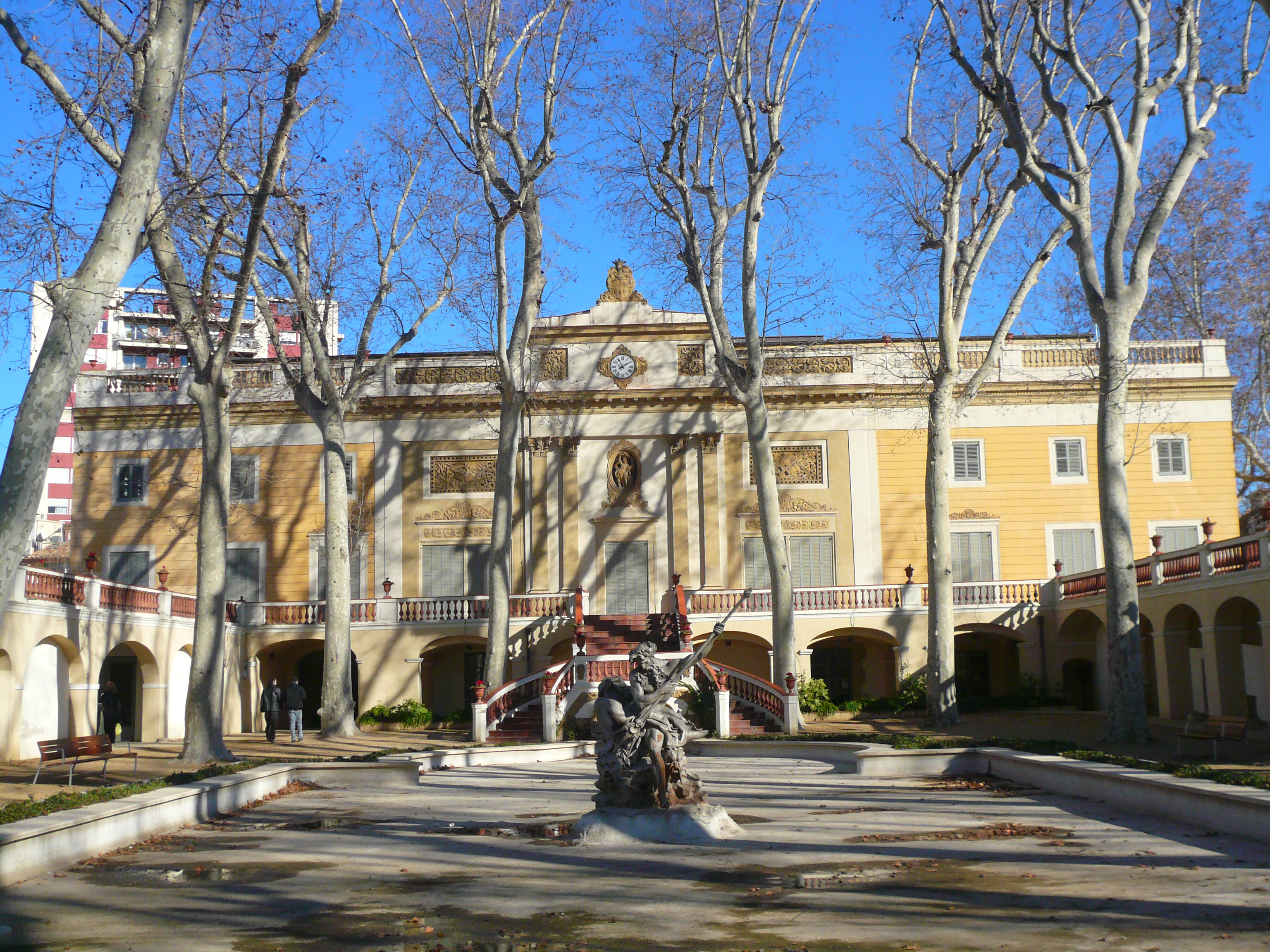 Can Falguera (Sant Feliu de Llobregat) Object location41° 22′ 51.35″ N, 2° 02′ 34.32″ E